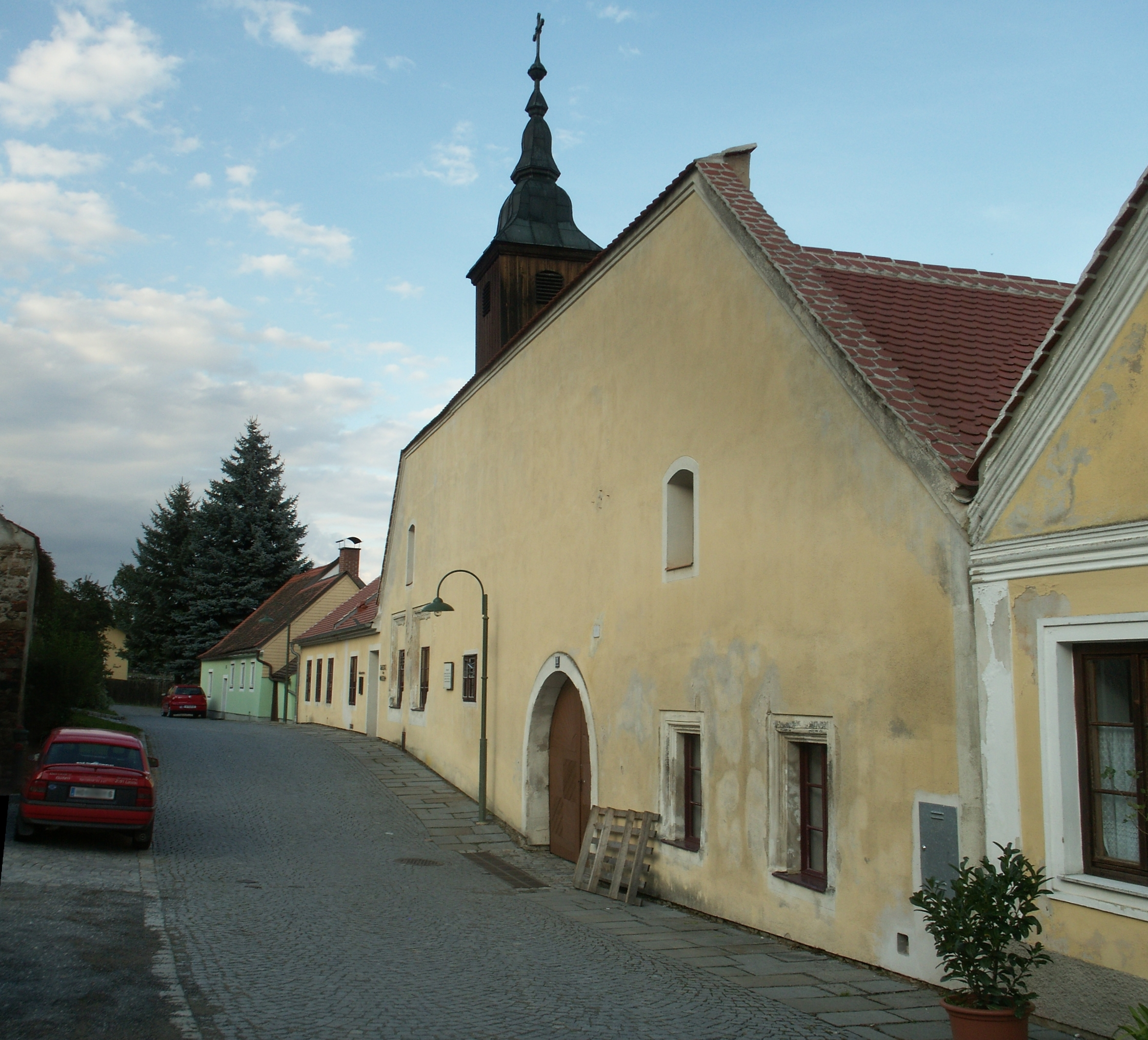 Drosendorf an der Thaya (Niederösterreich), Bürgerspital